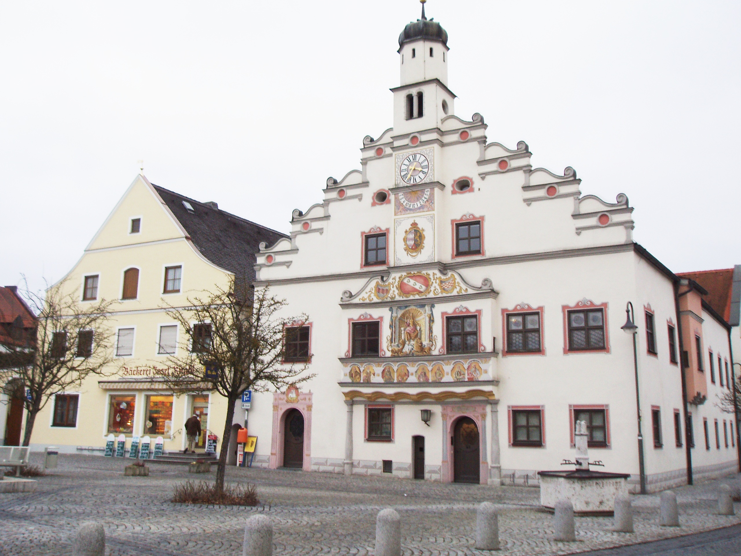 Gaimersheim im Landkreis Eichstätt, Rathaus